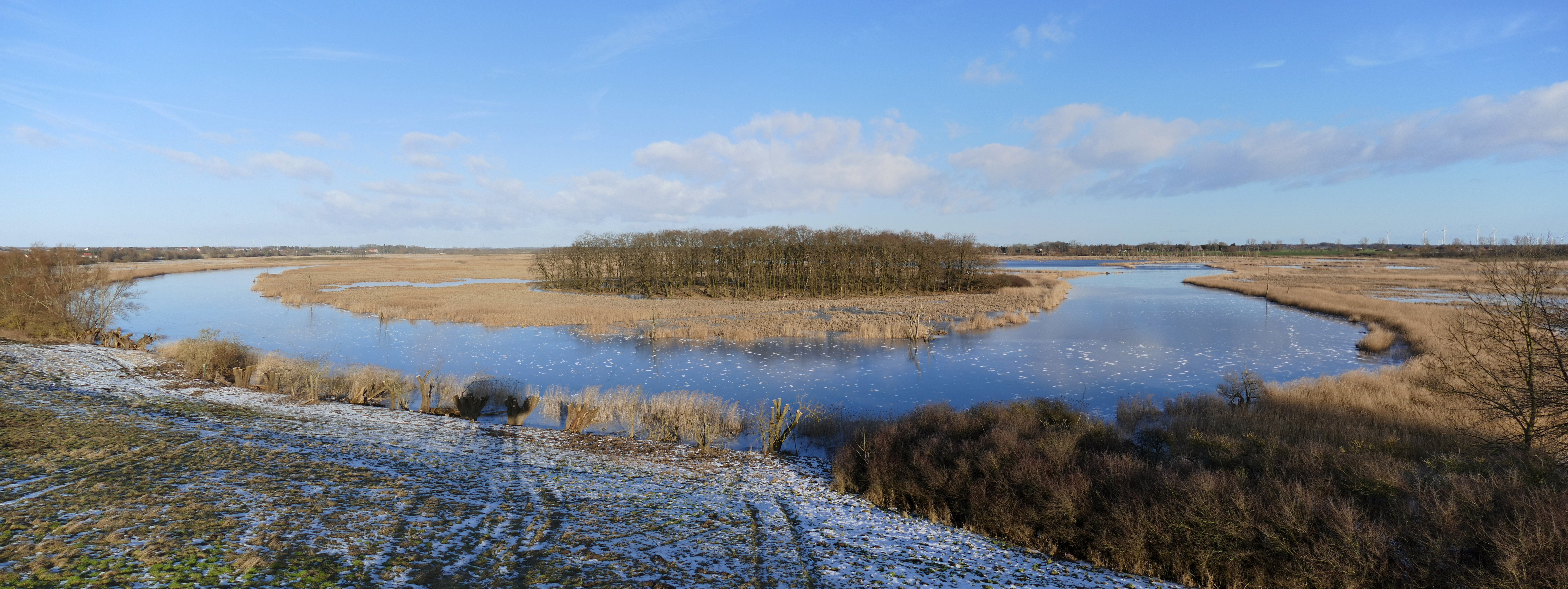 Altarm der Peene zwischen Randow und Pensin. Slawischer Burgwall Räuberberg im bewaldeten Bereich.